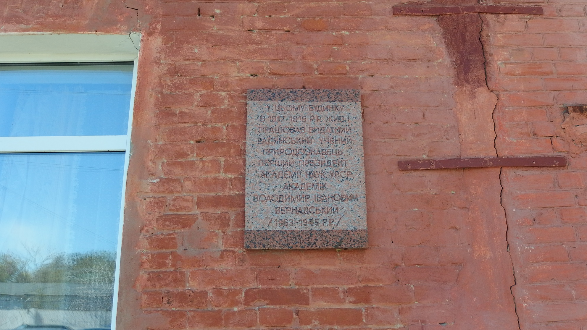 Дом, в котором жил и работал В. И. Вернадский в Полтаве, ул. Дмитриева 8.